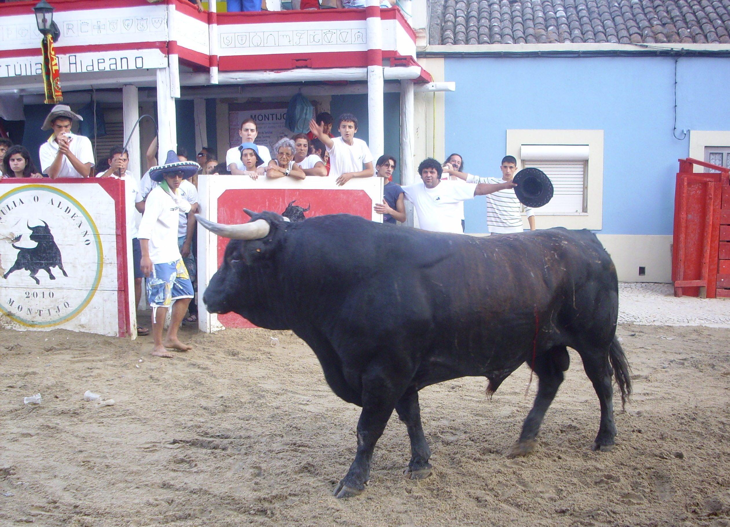 Montijo